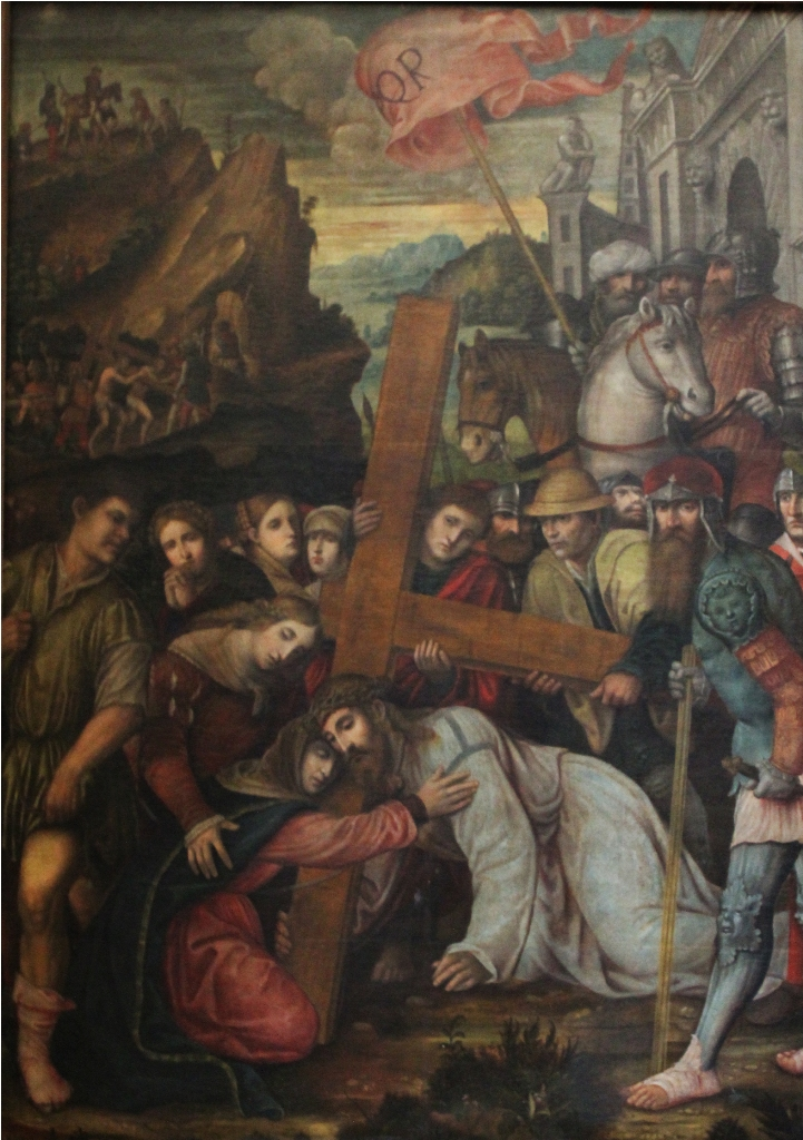 Salita al Calvario (Paolo da Caylina il Giovane) - Chiesa di S. Pietro in Oliveto - Brescia